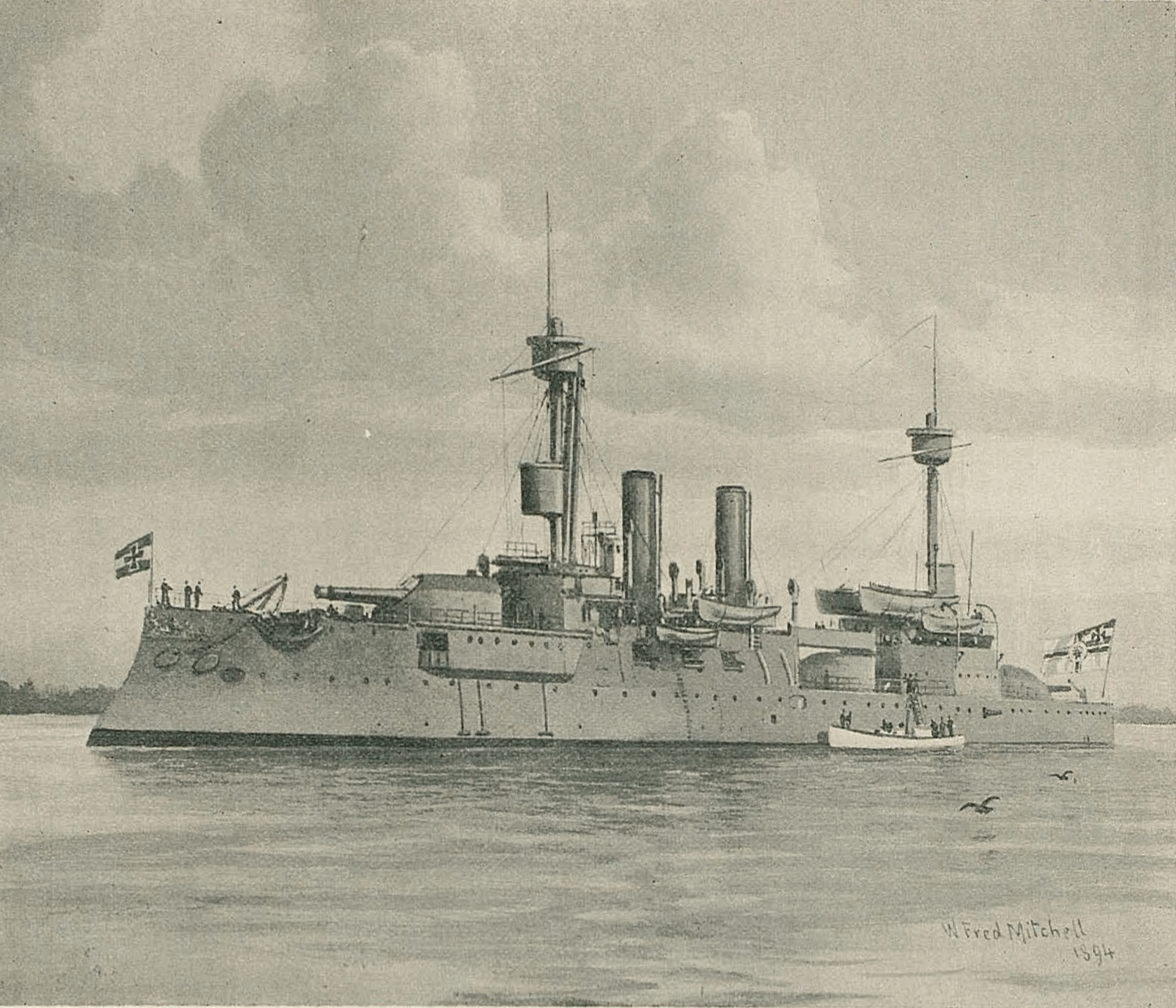 SMS Brandenburg